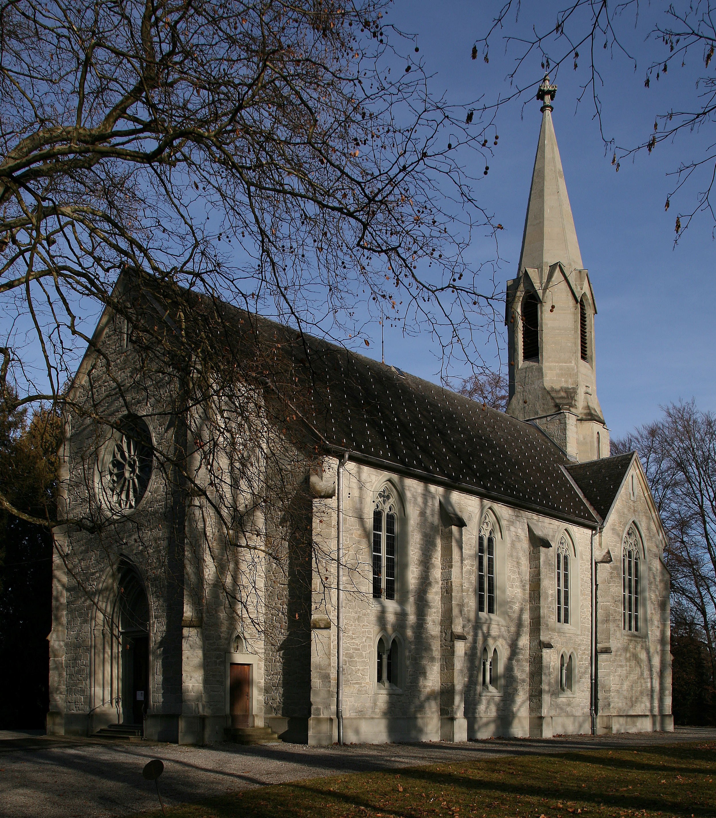 Evangelische Kirche Hl. Kreuz auf dem Ölrain in der Cosmus-Jenny-Strasse in Bregenz; erbaut in den Jahren 1862-1864 nach Plan von Carl Leins im Neogotischen Stil. Rieger Orgel 1981